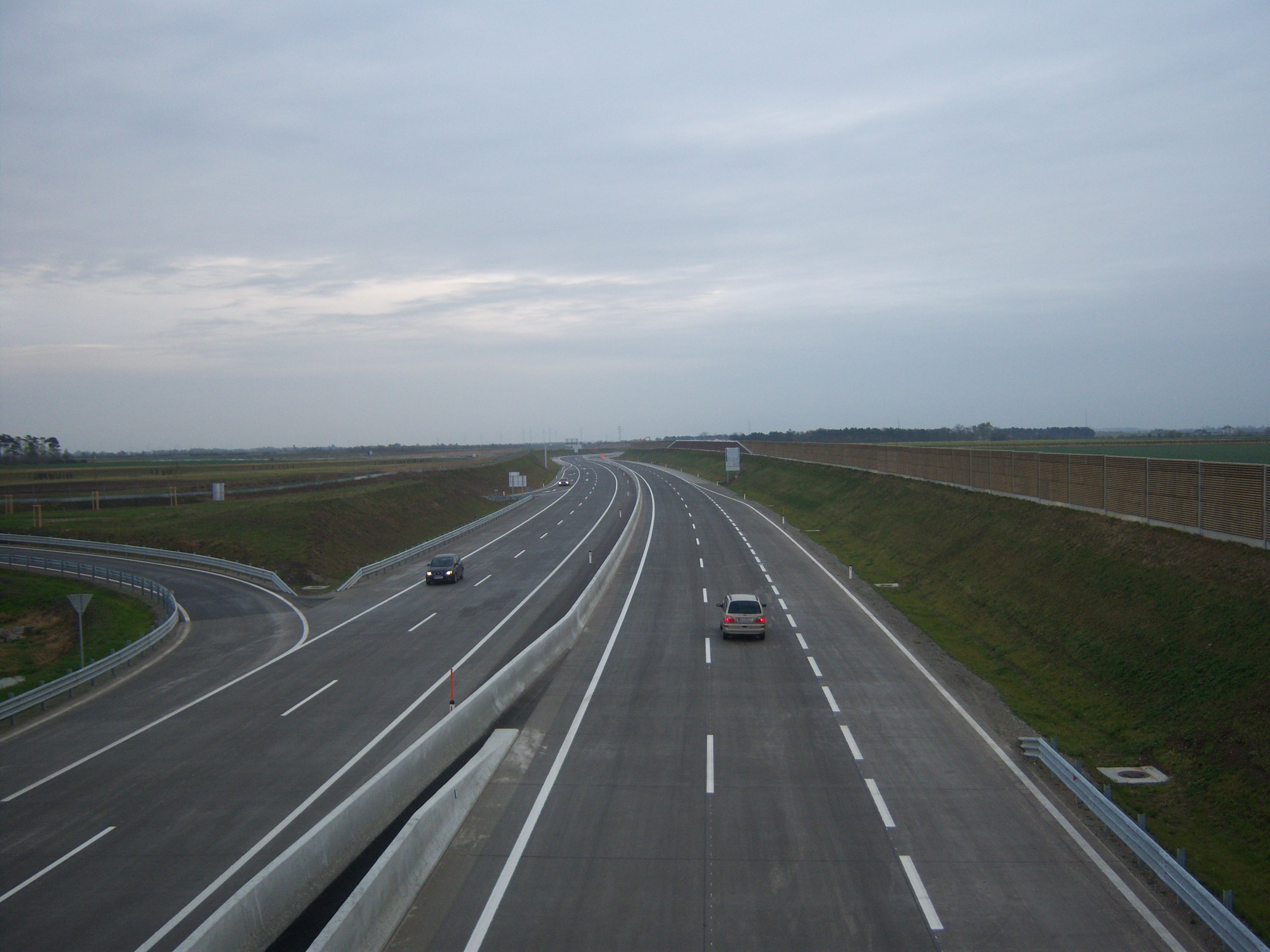 Wiener Außenring Schnellstraße S1 bei der Anschlussstelle Seyring, Blickrichtung Wien